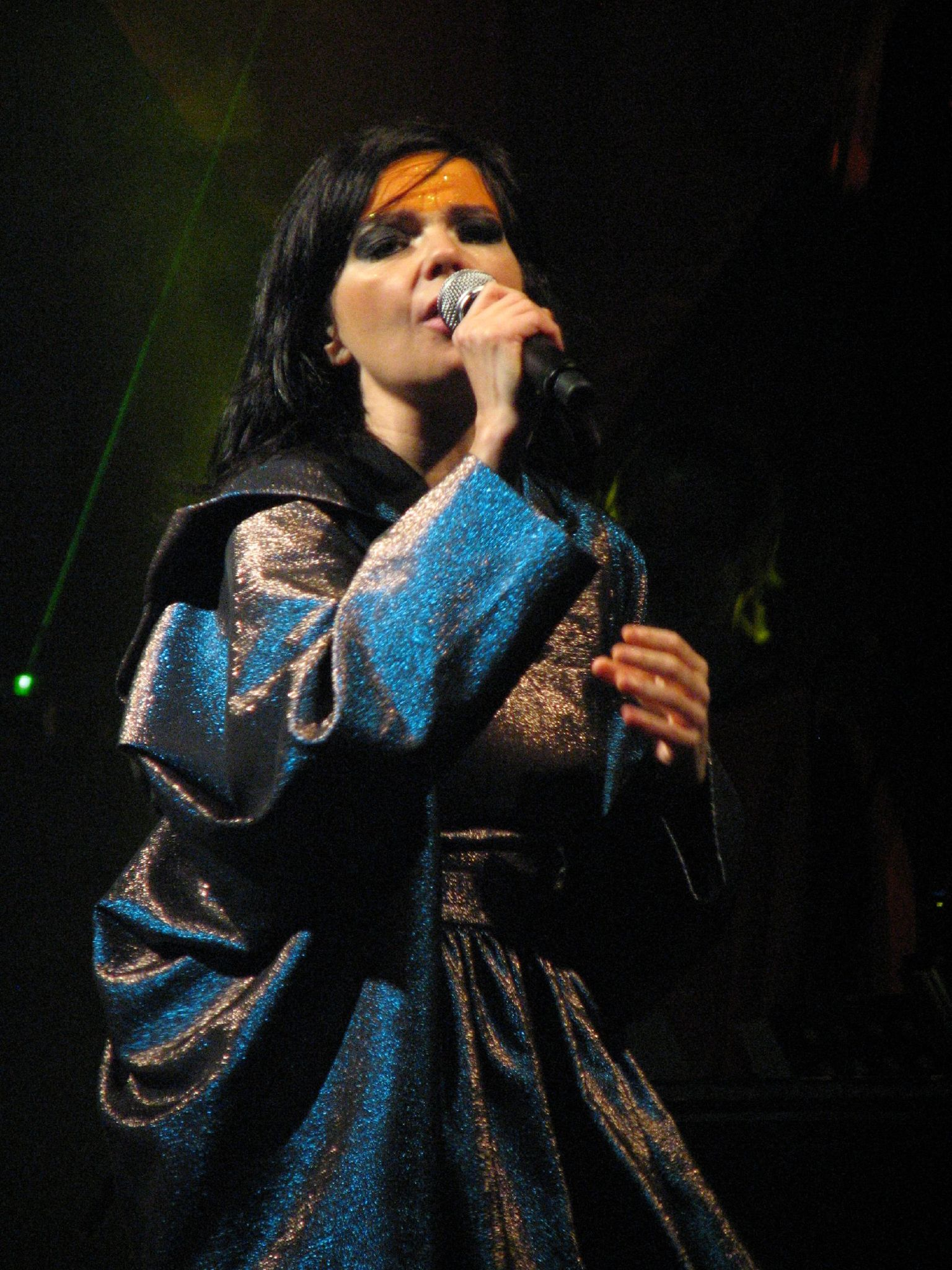 Björk performing in Vancouver in 2007.